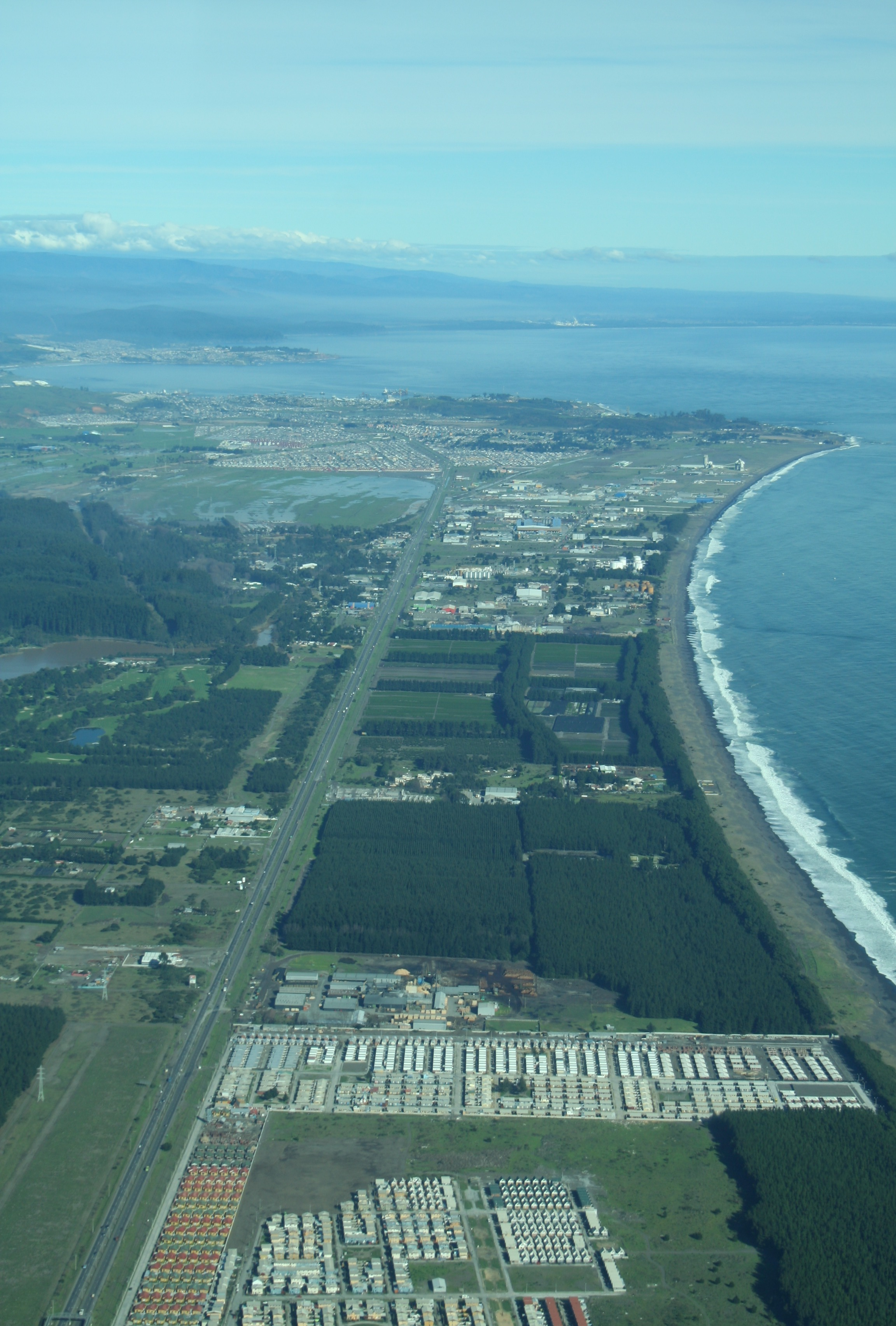 Vista aérea de el límite de Coronel con San Pedro de la Paz